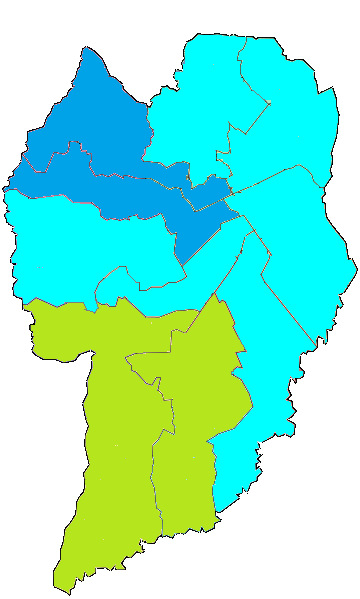 Resultado do segundo turno da eleição para a Prefeitura de Curtiba em 2012. Em verde locais mais votados para Ratinho Jr., em azul mais votado foi Gustavo Fruet, sendo azul escuro % maior que 70%.